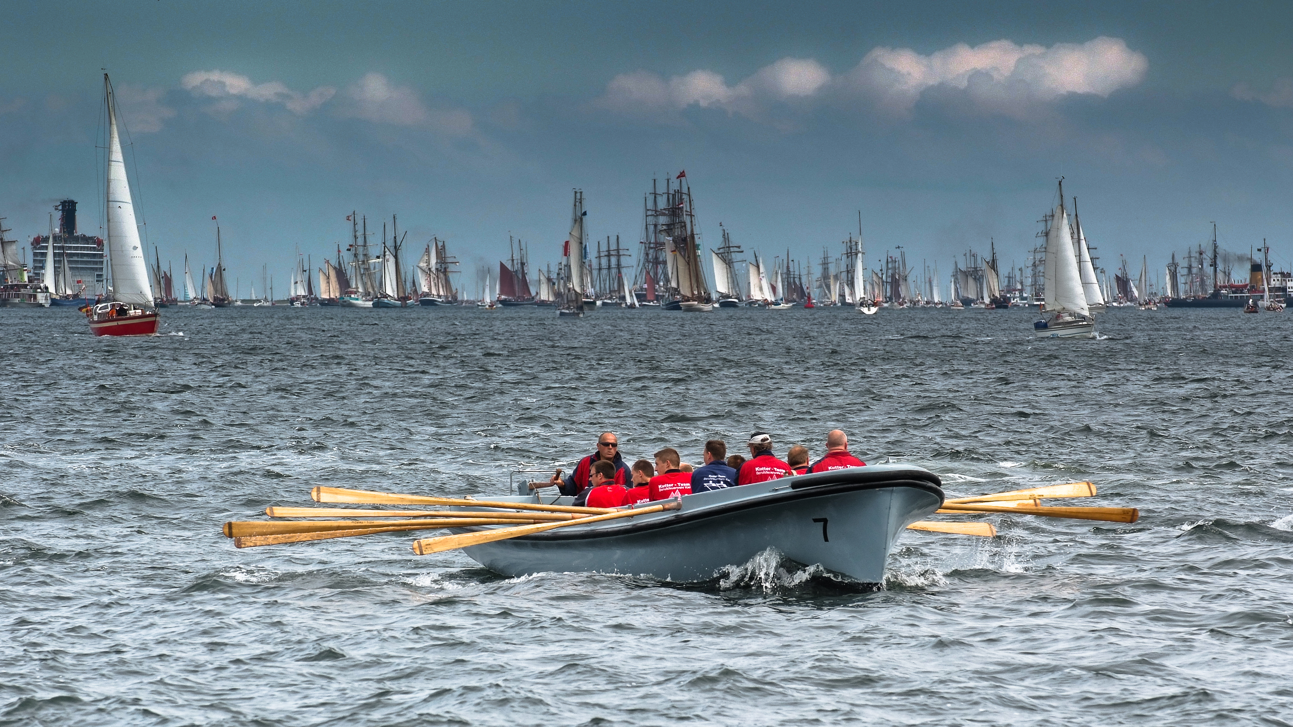 Marinekutter vor der Windjammerparade auf der Kieler Woche 2009. (Effekt durch Verlaufsfilter)